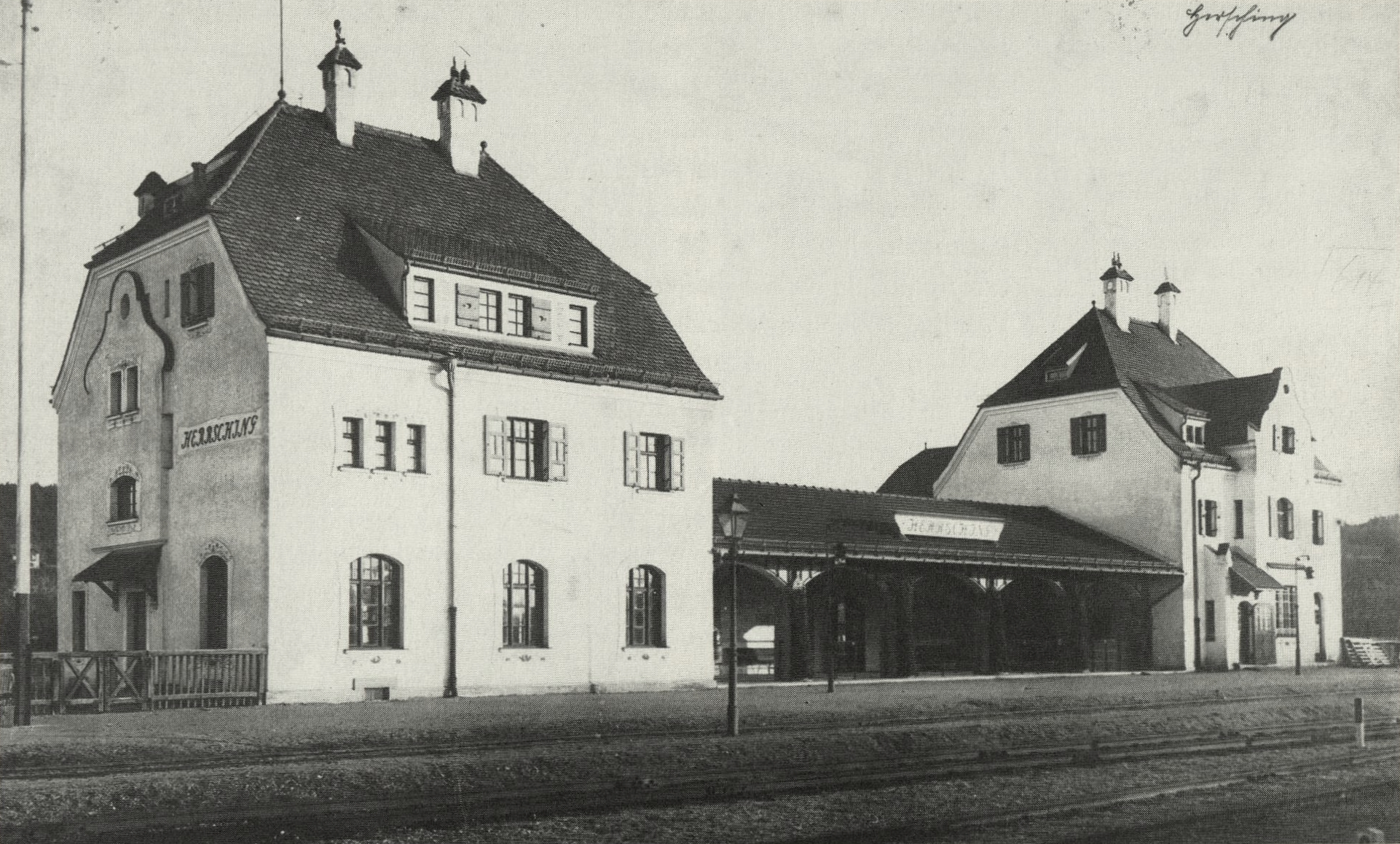 Empfangsgebäude des Bahnhofs Herrsching kurz nach der Erbauung von der Gleisseite